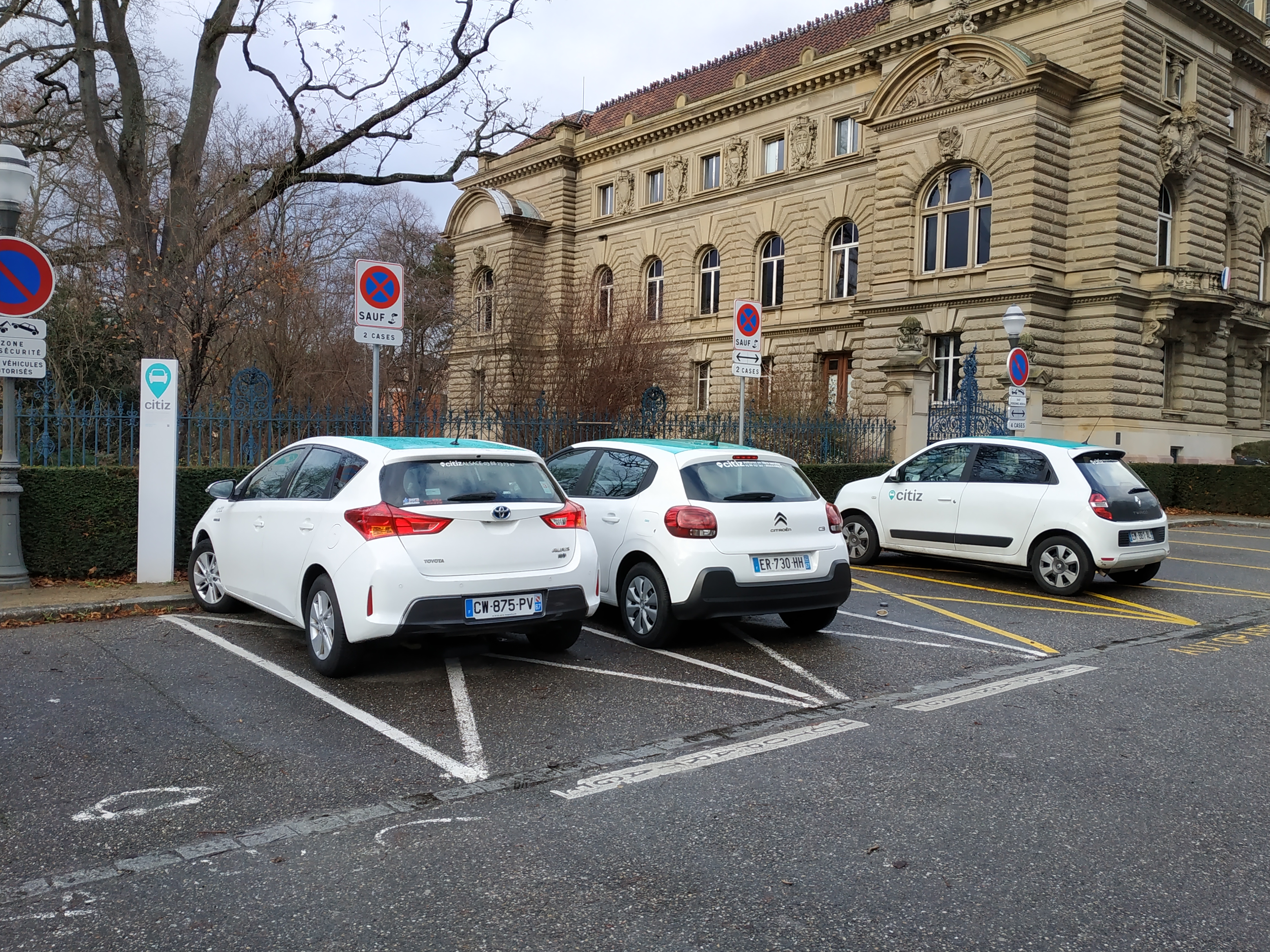 Véhicules Citiz sur des places réservées, place de la République à Strasbourg